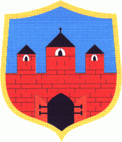 Herb gminy Jeżów, woj. łódzkie.